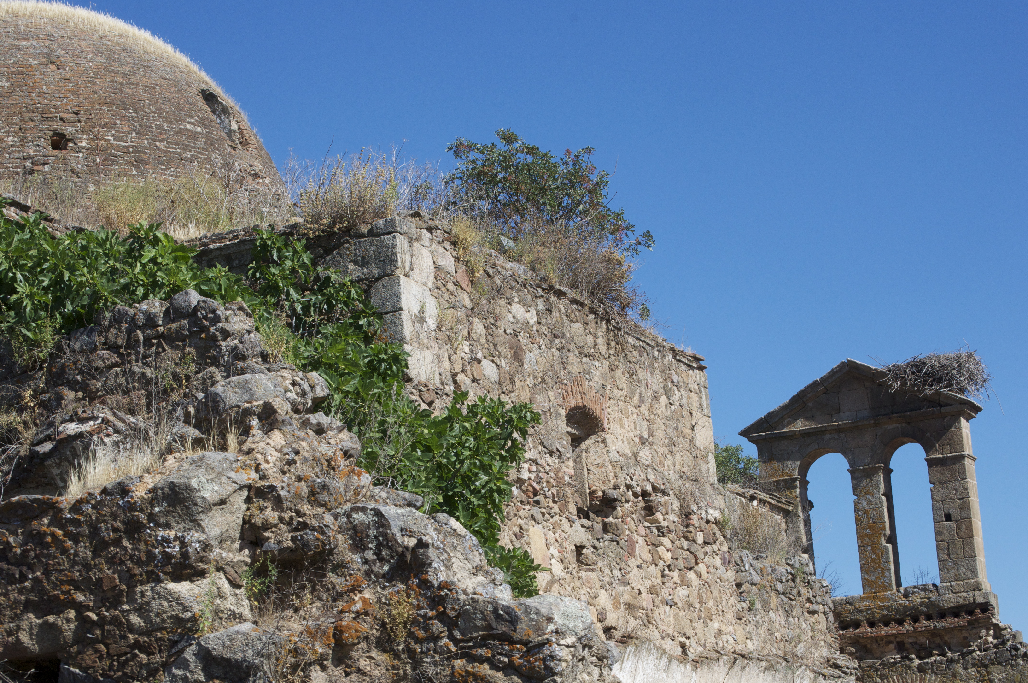 Iglesia del Convento de los Agustinos (Santa Cruz de la Sierra) Cáceres